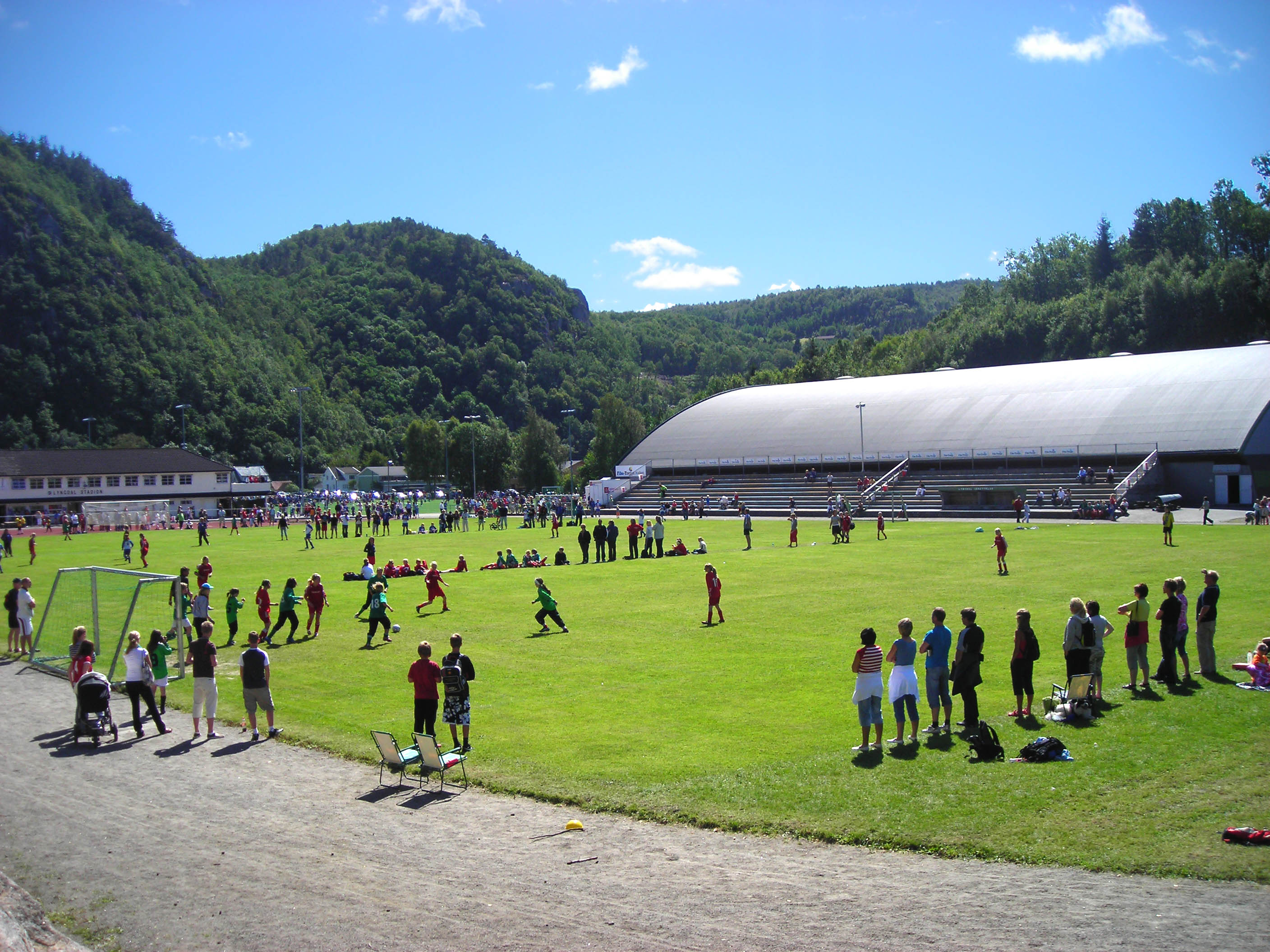 Lyngdal Cup 2007